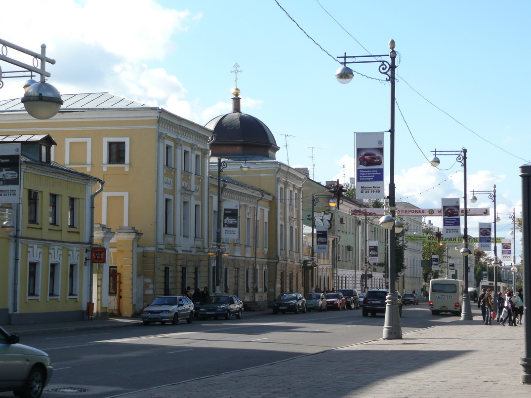 Церковь Двенадцати Апостолов при Архиерейском доме в Твери